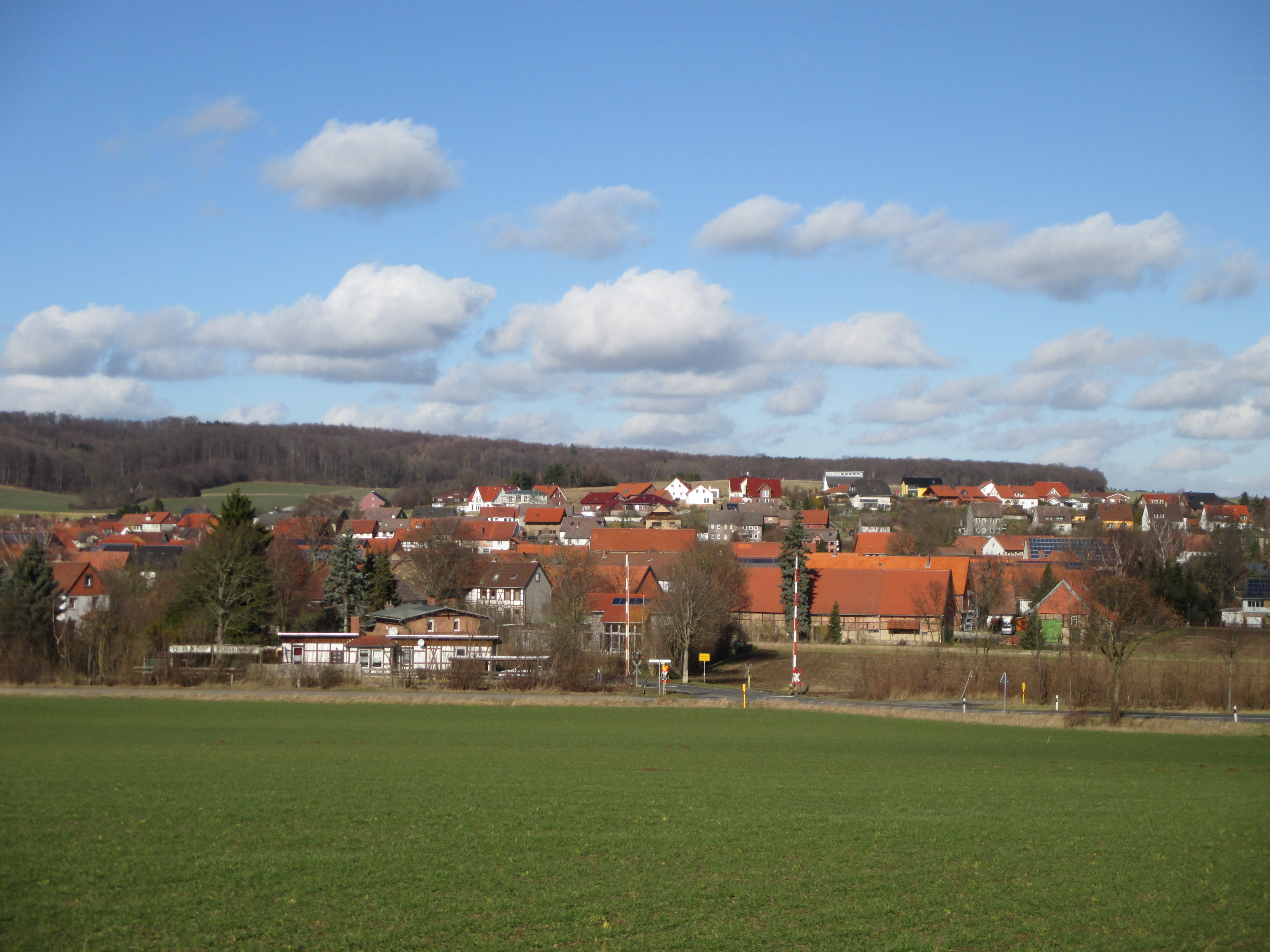 Blick auf Werlaburgdorf von Süden, Gemeinde Schladen-Werla